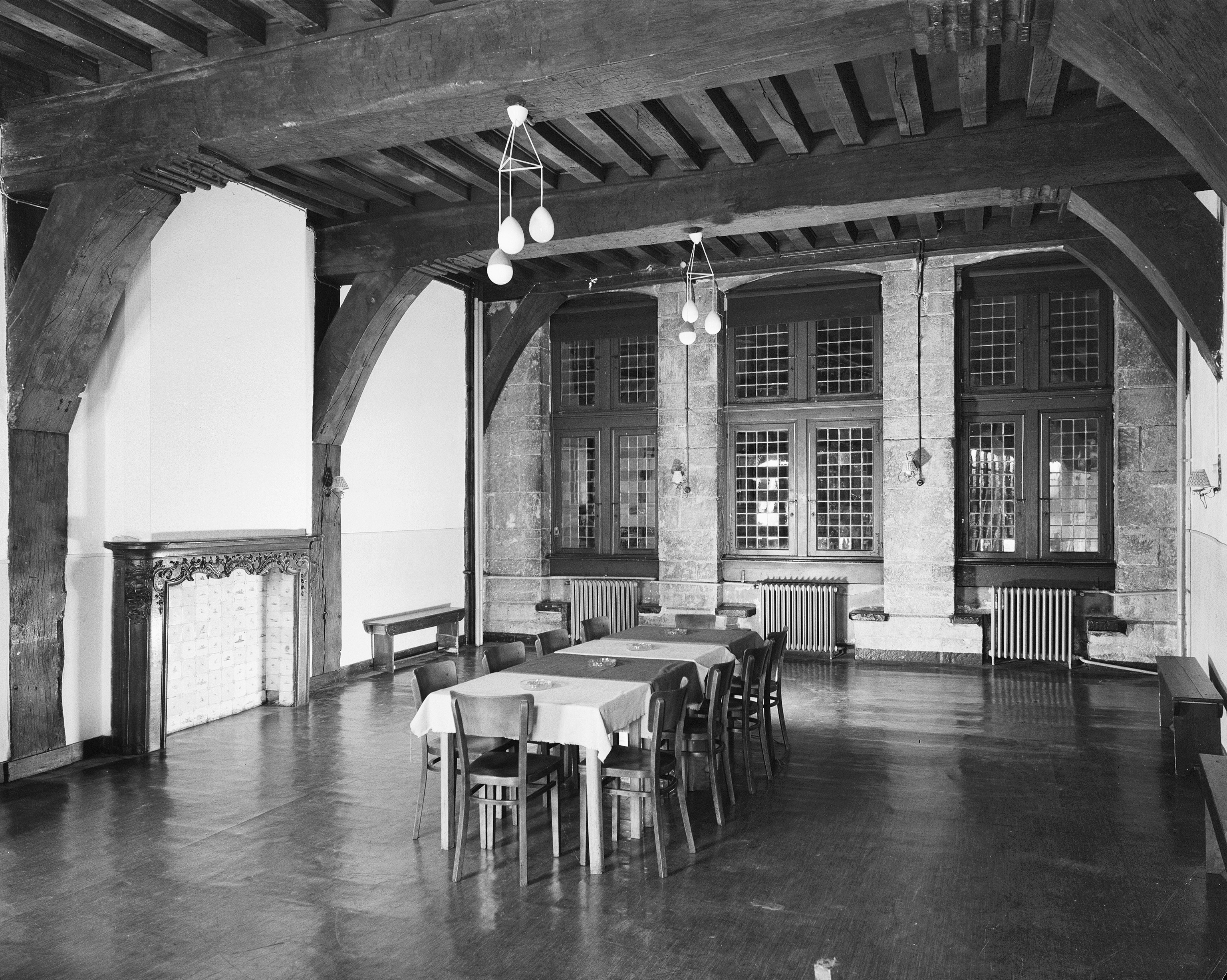 Dinghuis, Maastricht: 2e verdieping naar het zuid-westen